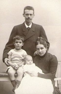 Niels Ryberg Finsen with his wife Ingeborg and children Halldor and Gudrun.